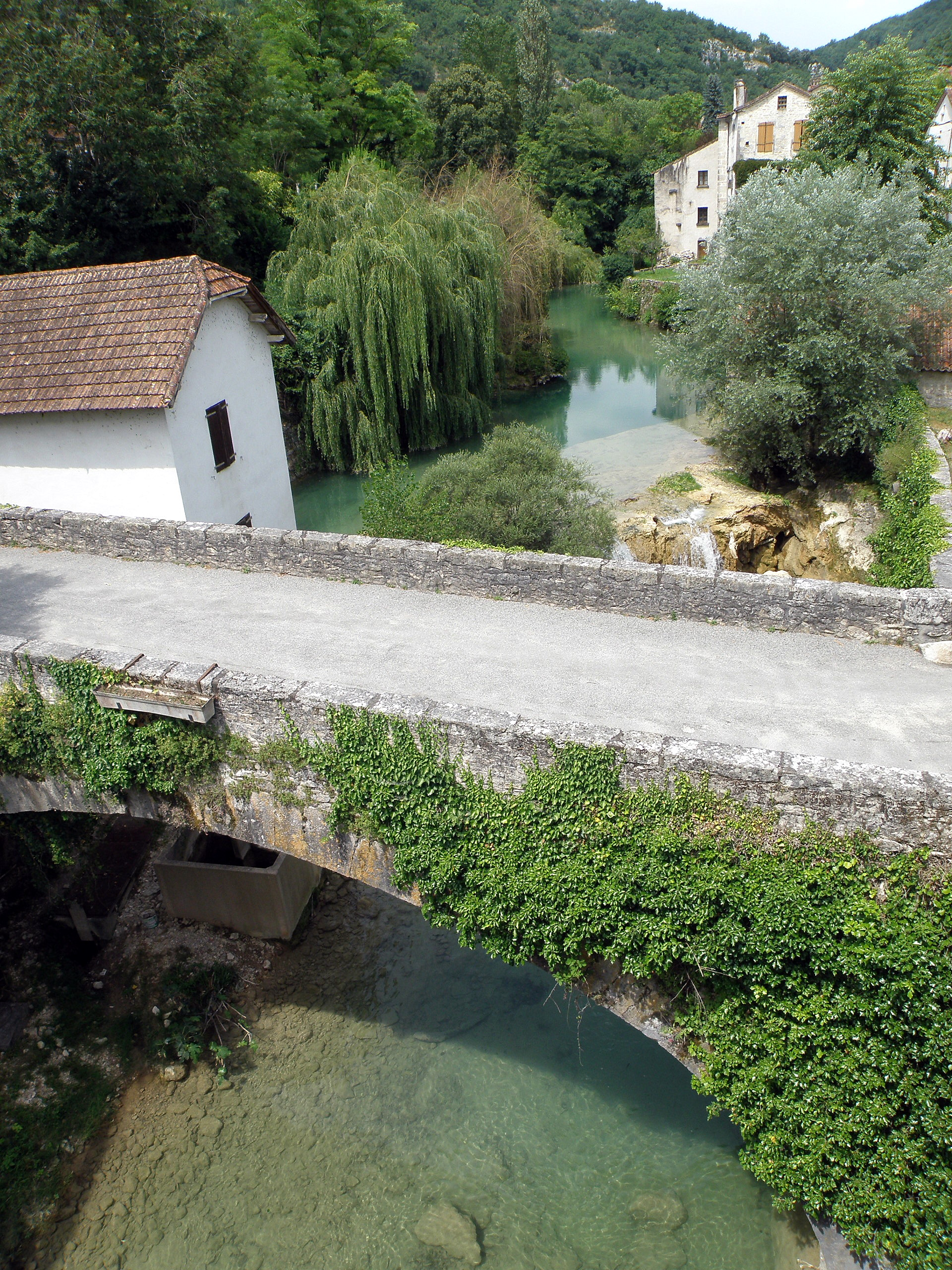 Vers, comm. et village du départ. du Lot, au confluent du Lot et du Vers. La rivière Vers près des moulins.